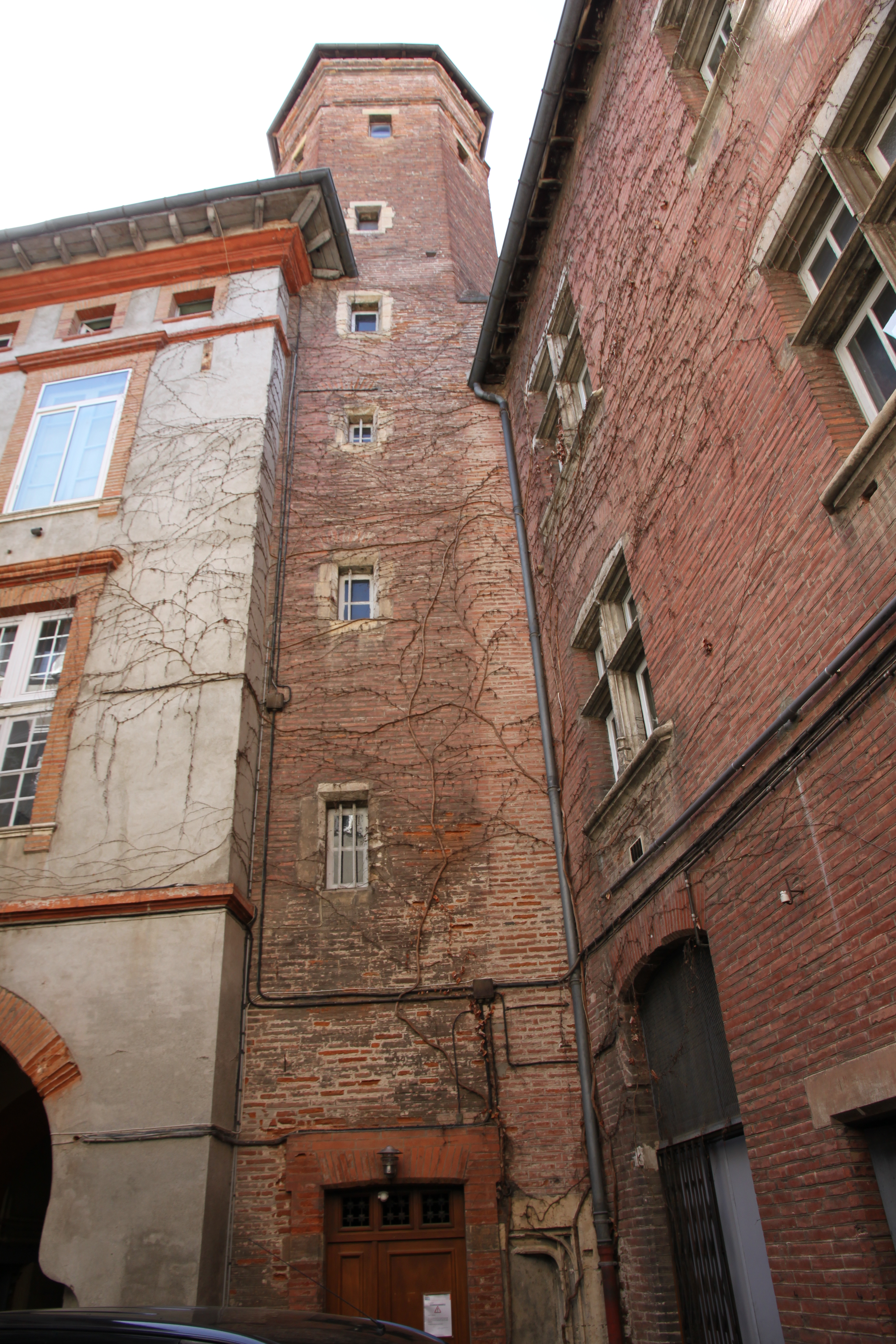 Tour capitulaire dans la cour de l'hôtel Ysalguier